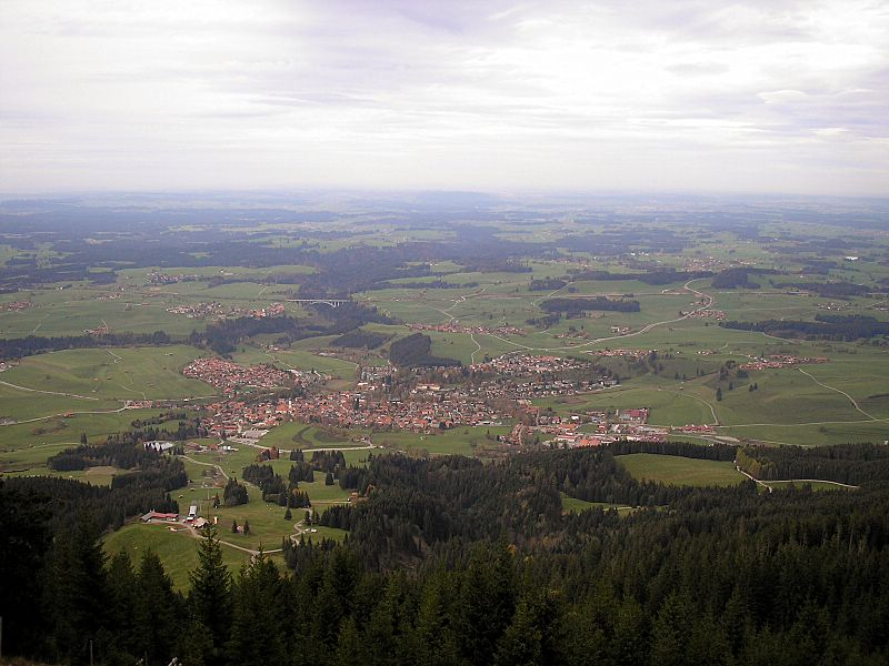 Nesselwang (Landkreis Ostallgäu, Bayern). Gesamtansicht vom Alpspitz. Eigene Aufnahme, Okt. 2006 / Nesselwang near Fuessen (Bavaria, Germany). Total view from Mount Alpspitz. Own photo, Oct. 2006